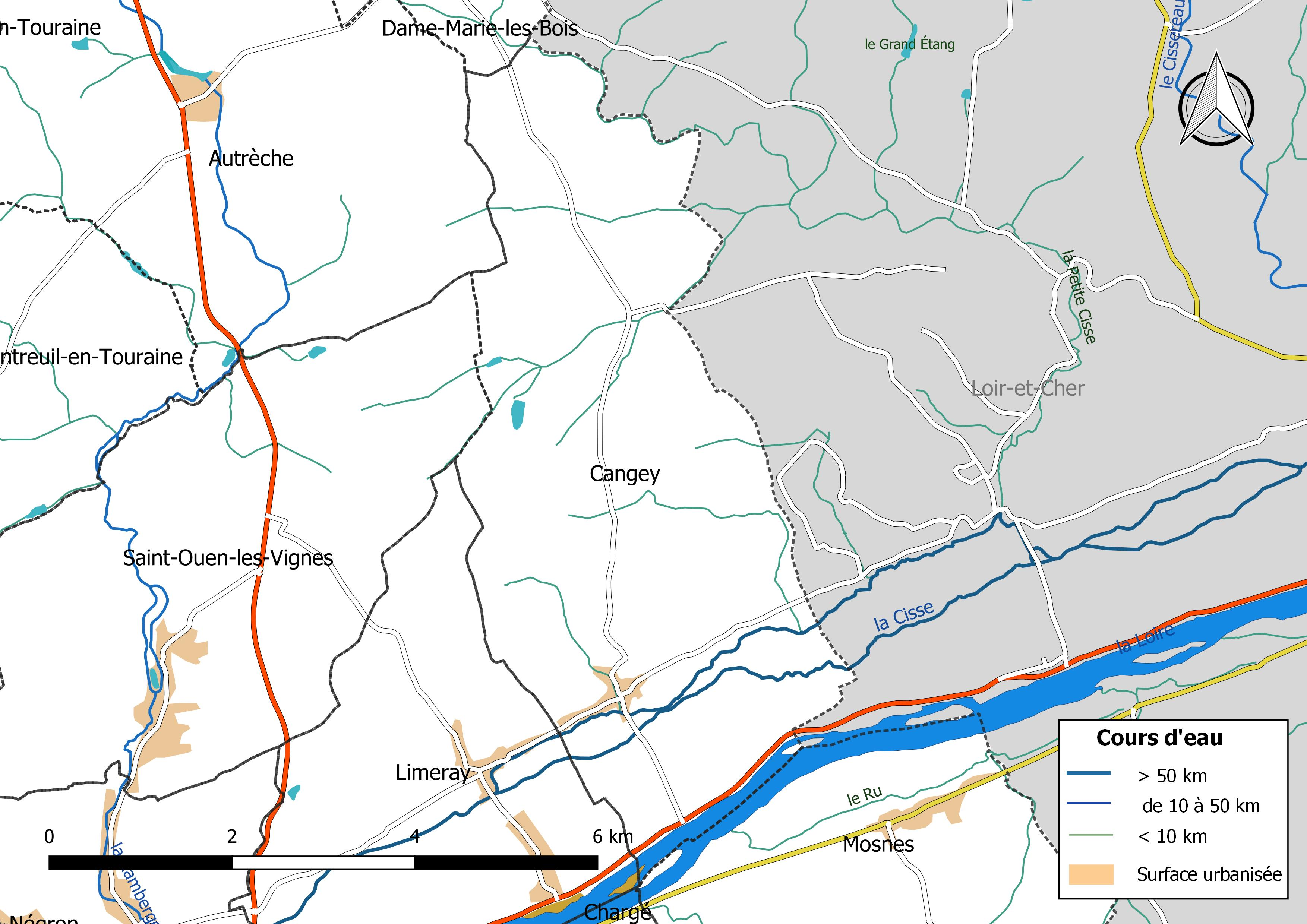 Carte du réseau hydrographique de la commune de Cangey (France).